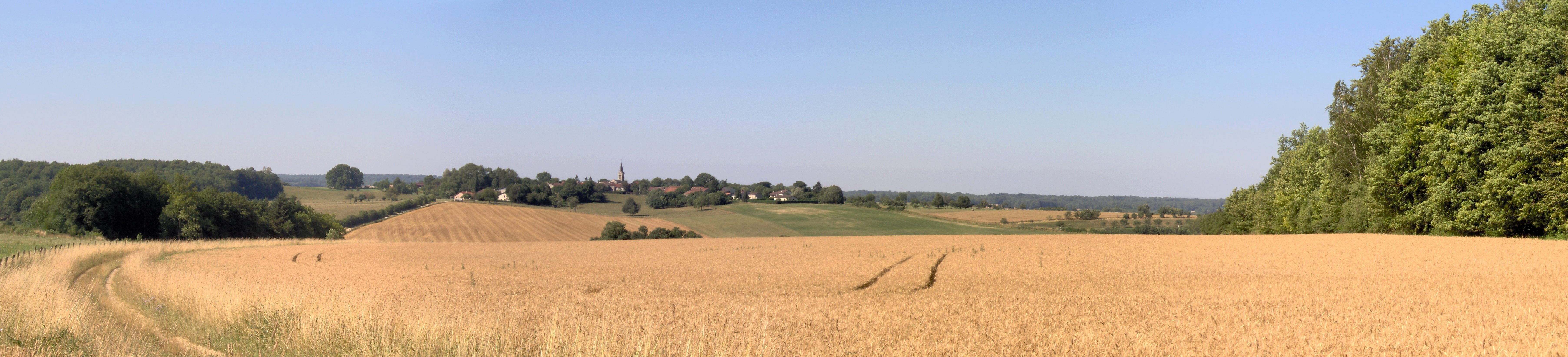 Panorama de Fouchères-aux-Bois (France, 55). Cette vue est prise depuis le nord-est du territoire de la commune. Date de prise de vue : le 16 juillet 2006 en matinée.